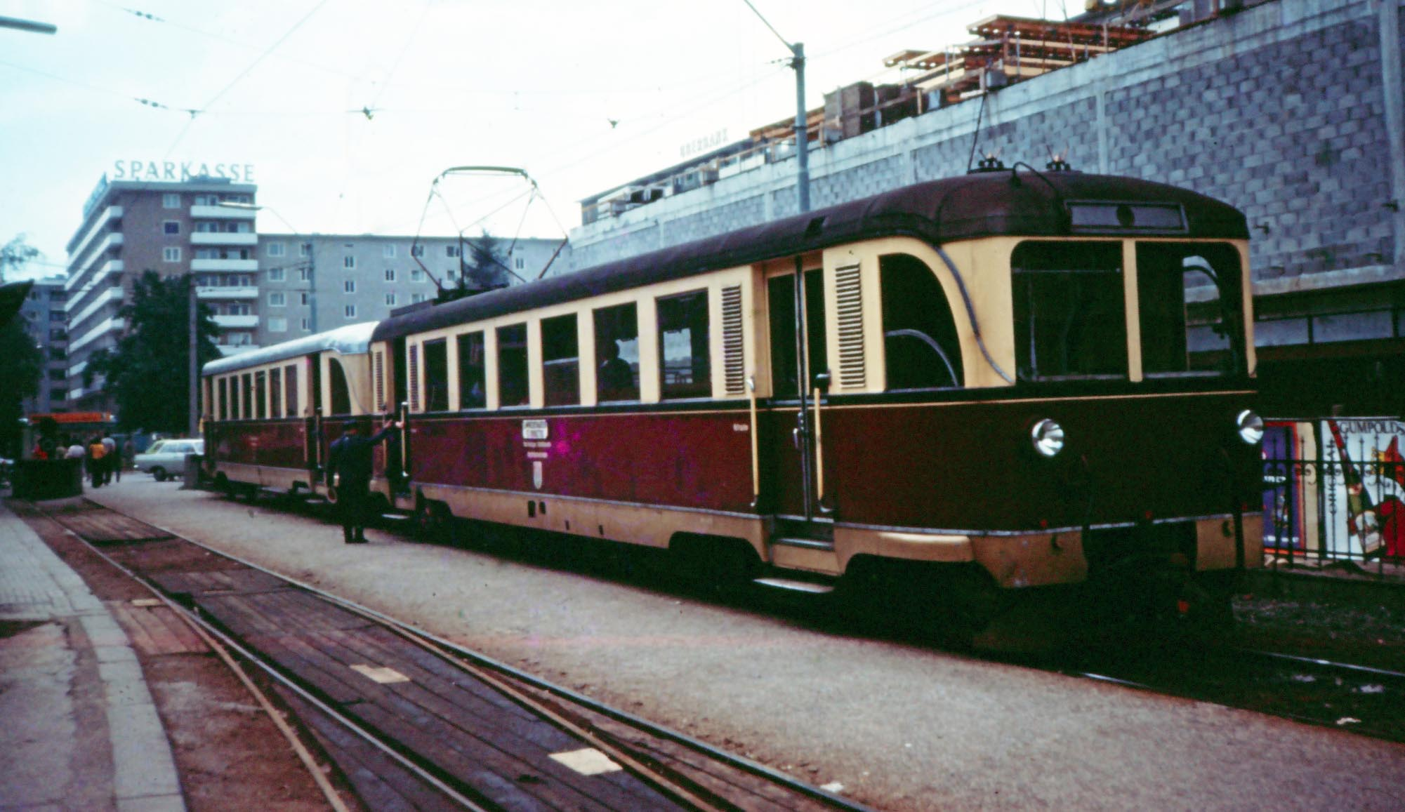 Abfahrberiter Zug der Salzburger Lokalbahn ca. 1974